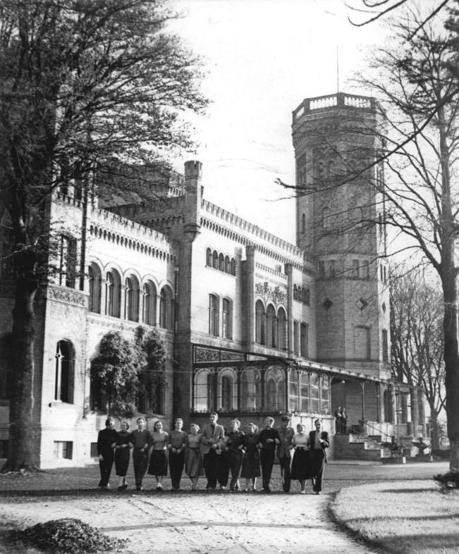 Zentralbild-Klein ,15.11.1954 Staatliches Ensemble der Dorfjugend im Schloss in Neetzow im Kreis Anklam. Neue Studienmöglichkeiten für die Jugend auf dem Lande. Das Schloß in Neetzow, vor 100 Jahren von einem italienischen Baumeister erbaut, war bis vor wenigen Jahren der Sitz des Krautjunkers Rittmeister von Kruse. Jetzt ist das Staatliche Ensemble der Dorfjugend in seine Räume eingezogen.